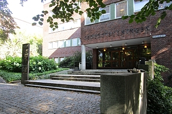 Institutt for geofag (UiO) Geologibygningen, Blindern.